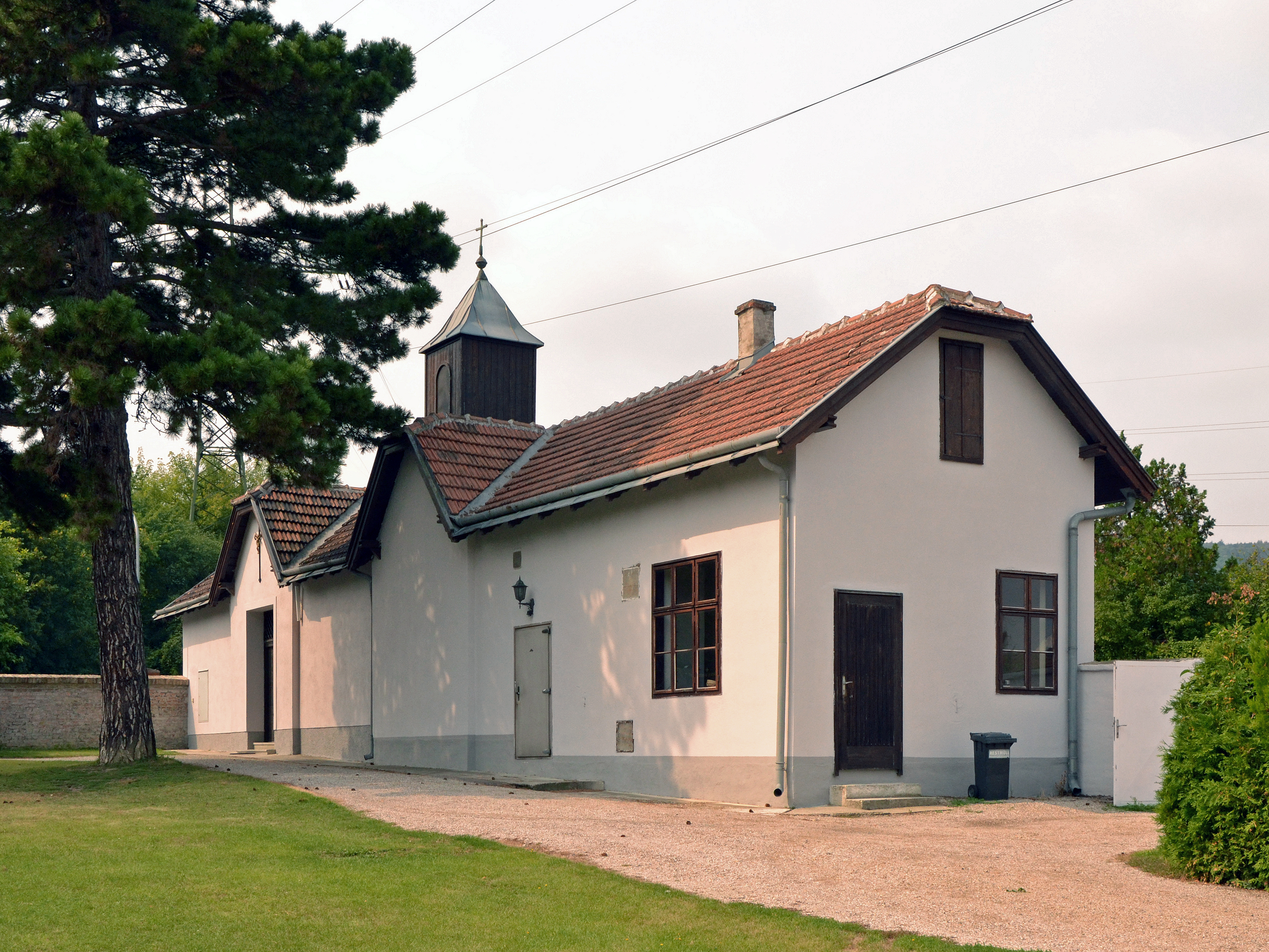 Oberer Stadtfriedhof, Klosterneuburg, Meynertgasse 39–41